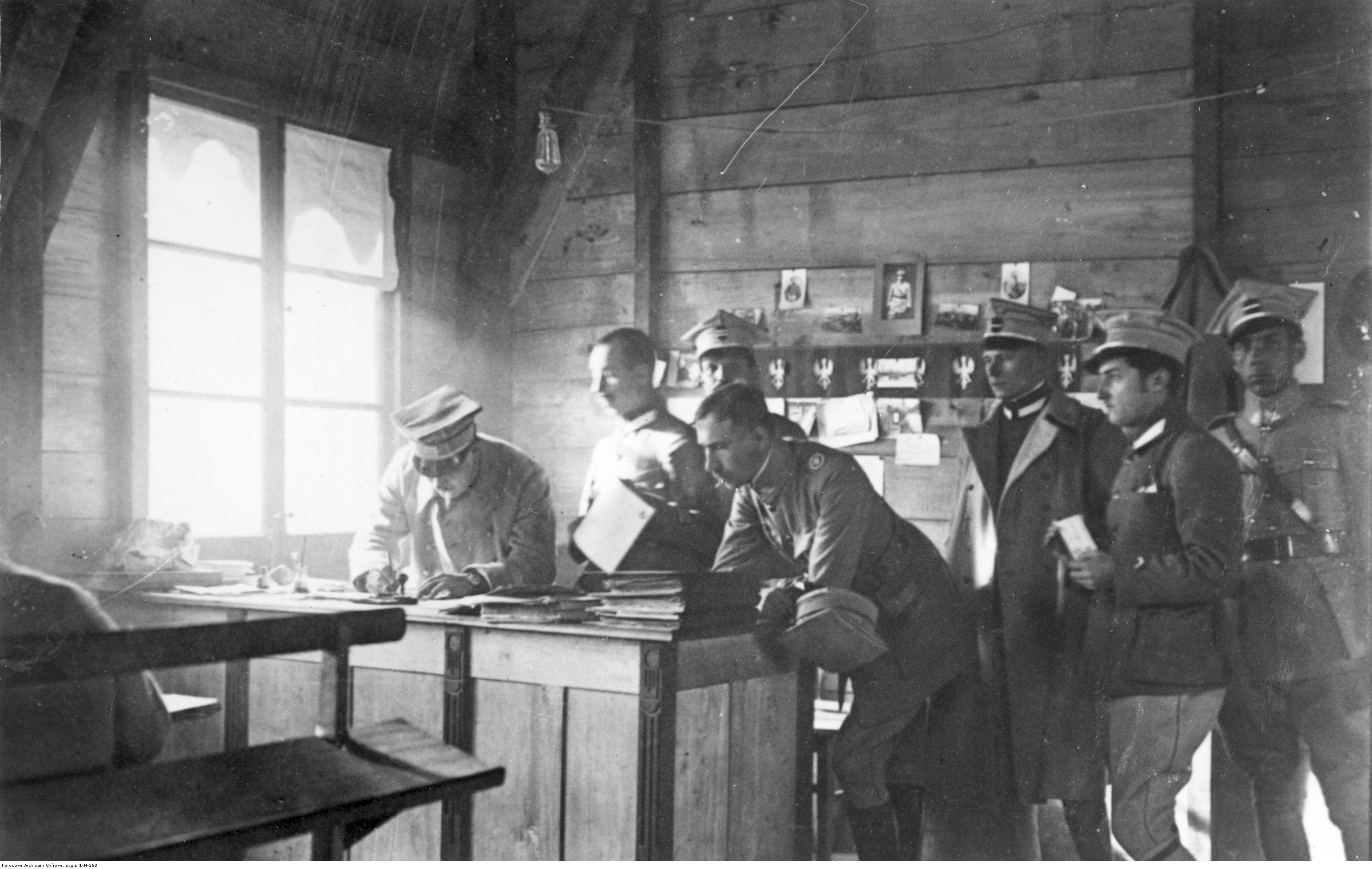 Polski obóz wojskowy w Santa Maria Capua Vetere pod Neapolem - grupa organizatorów oddziałów wojskowych. Koncern Ilustrowany Kurier Codzienny - Archiwum Ilustracji. Sygnatura: 1-H-268